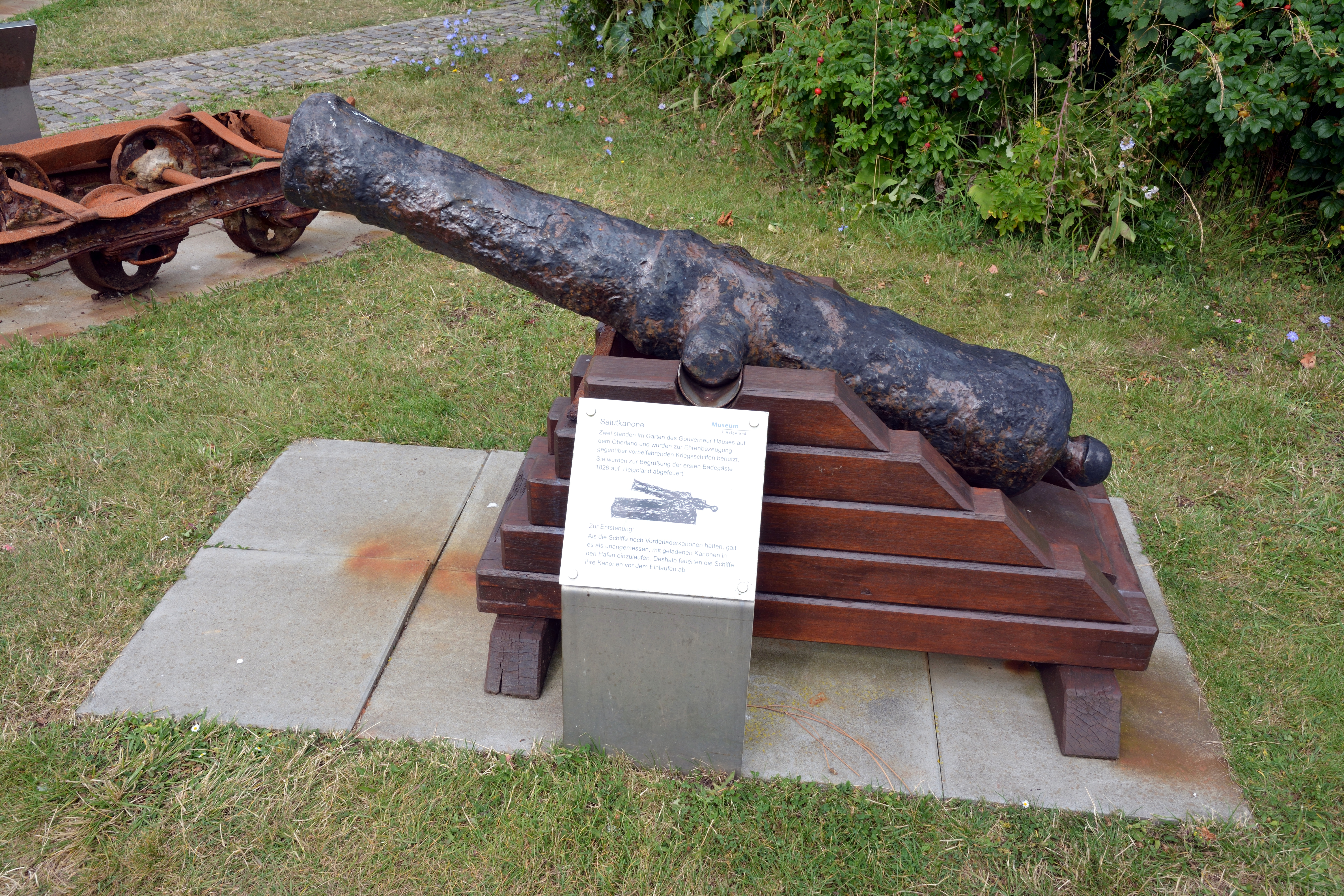 Bilder von Helgoland im Juli 2019Im Eingangsbereich des Museums Helgoland: Eine Salutkanone